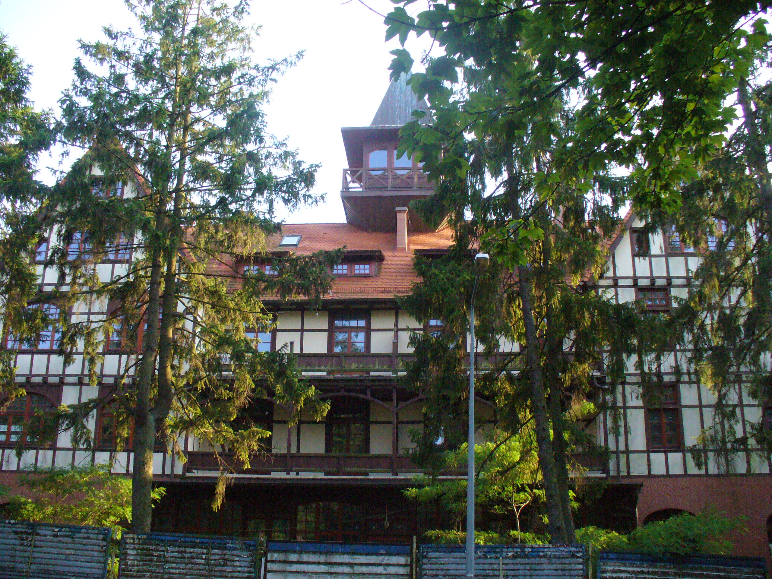 Spacerkiem po Krynicy Morskiej